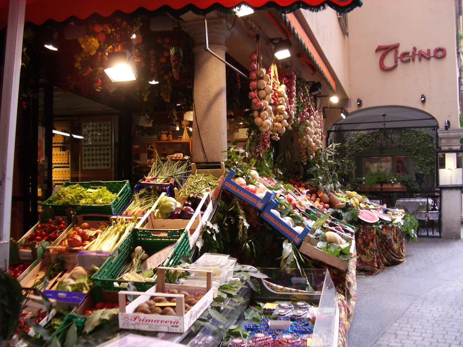 Lugano TI, Switzerland self-made, June 2006